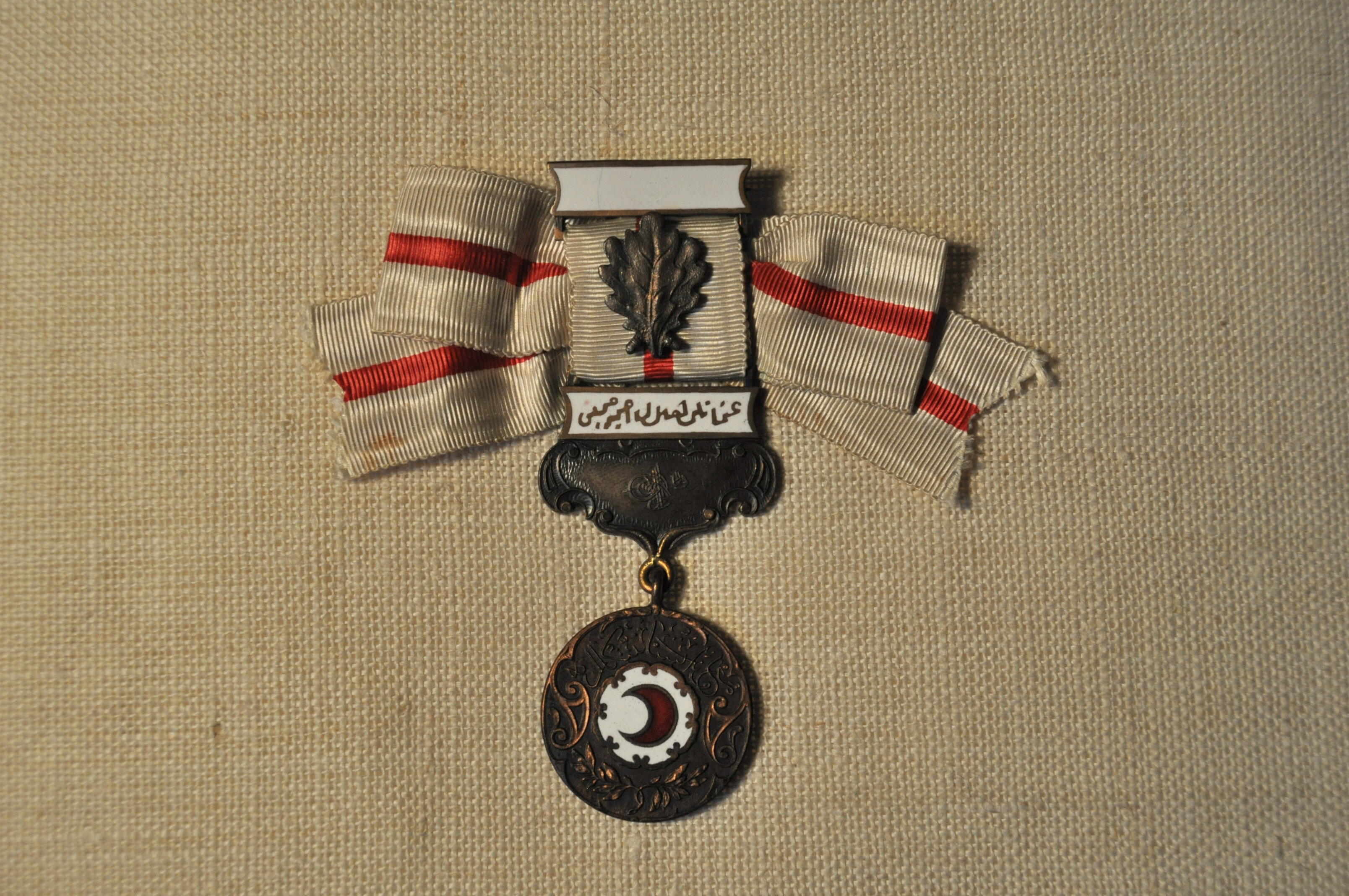 Verdienstmedaille vom Roten Halbmond in Bronze. Bandschleife für Frauen, mit Eichenblatt. VS